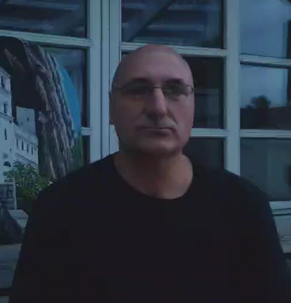 Славко Лабовић, глумац